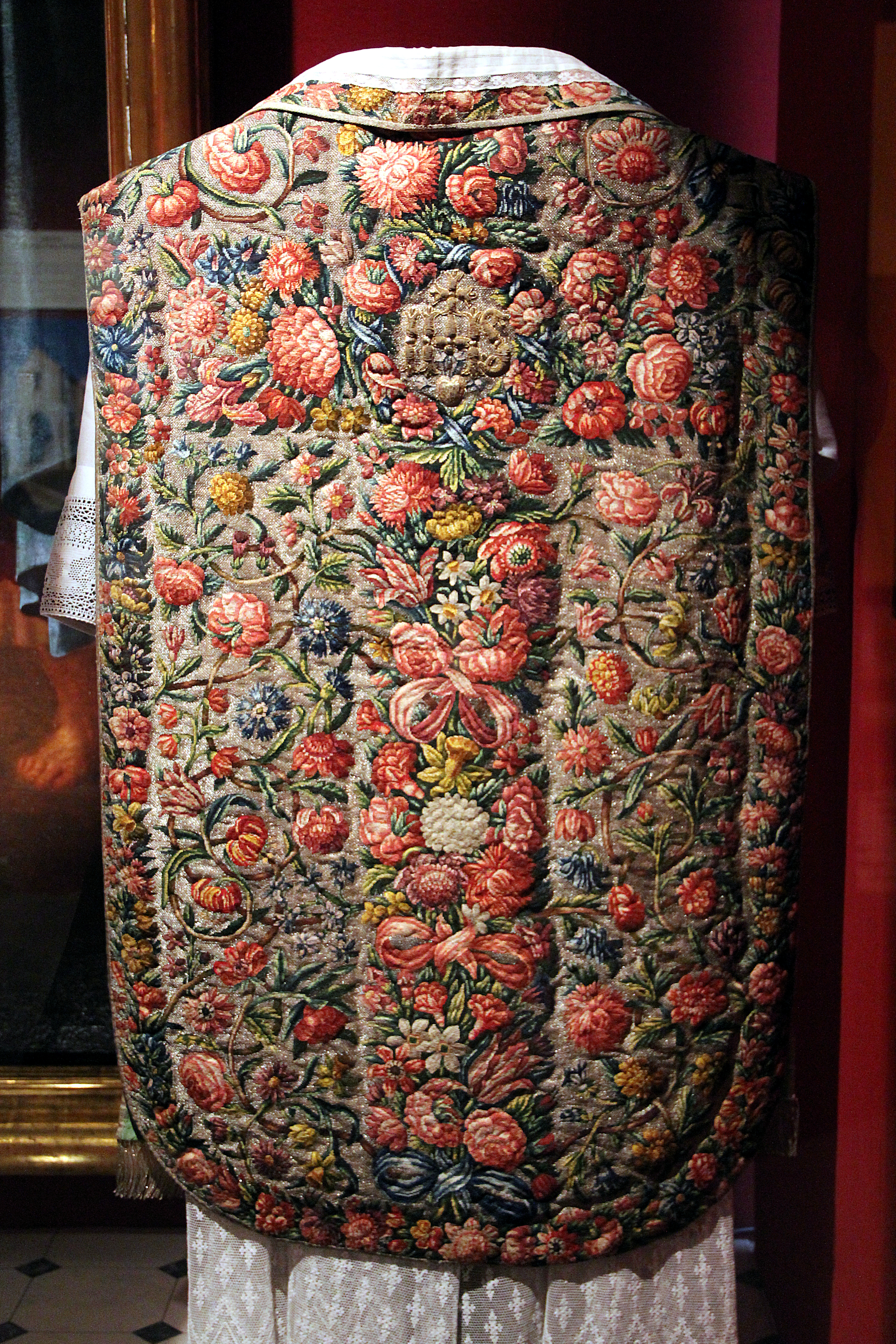 Chasuble brodée du XVIIe siècle faisant partie des collections du château de Vaux-le-Vicomte - Maincy (Seine-et-Marne, France).